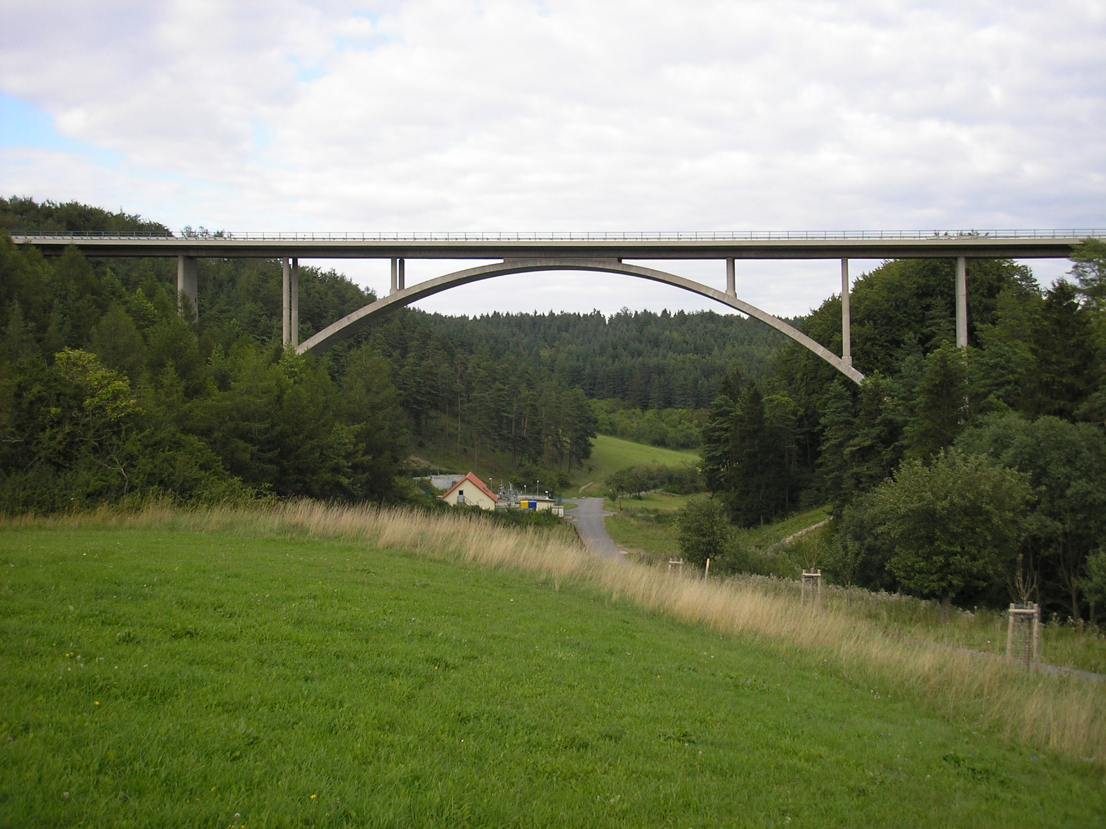 Die Wirrbachtalbrücke (B88) bei Geschwenda in Thüringen